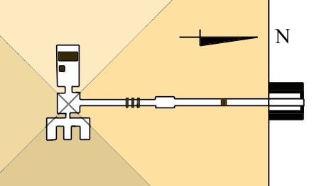 Plan des appartements funéraires de la pyramide de Mérenrê Ier à saqqarah